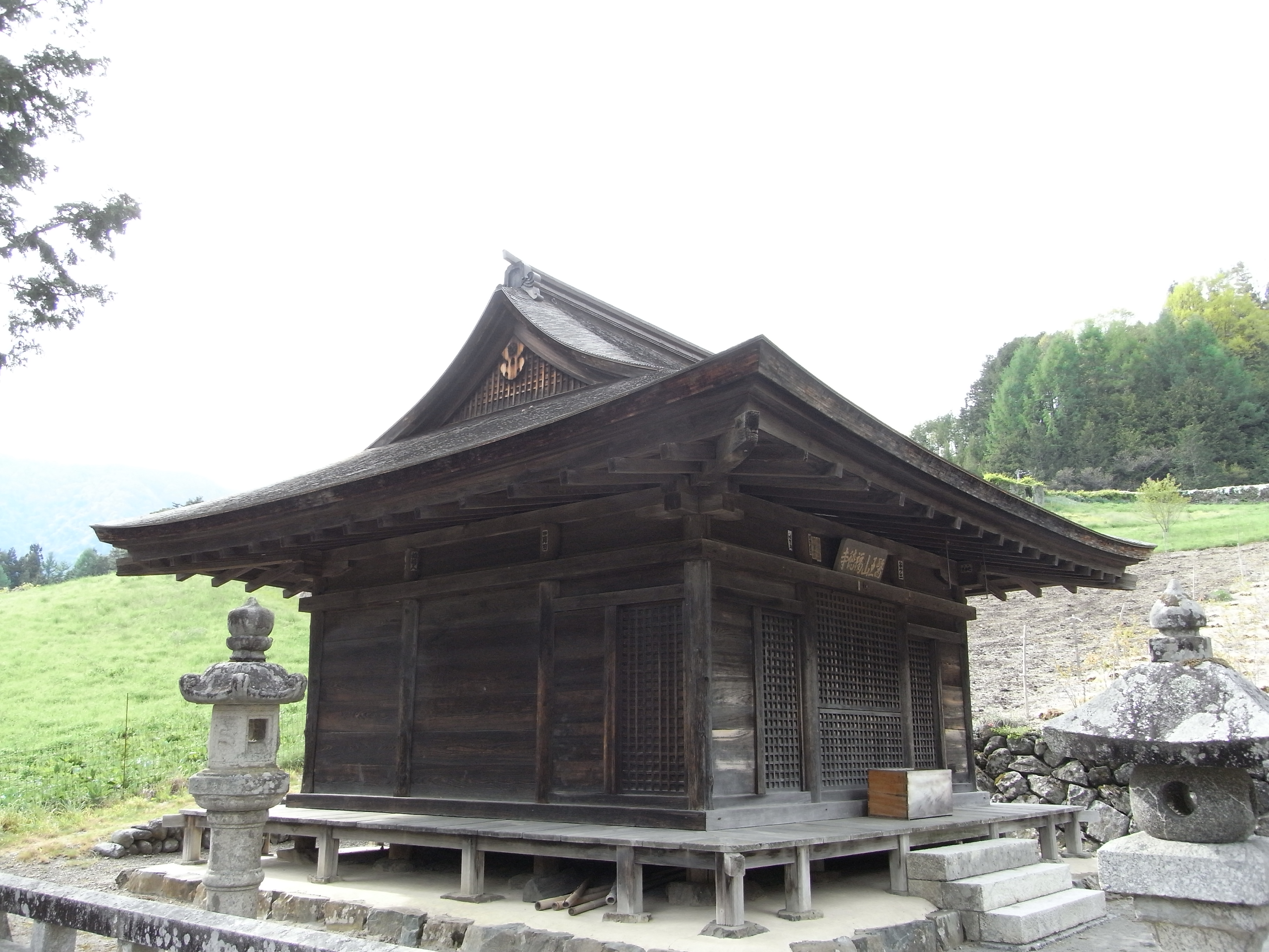 長野県下伊那郡大鹿村福徳寺本堂